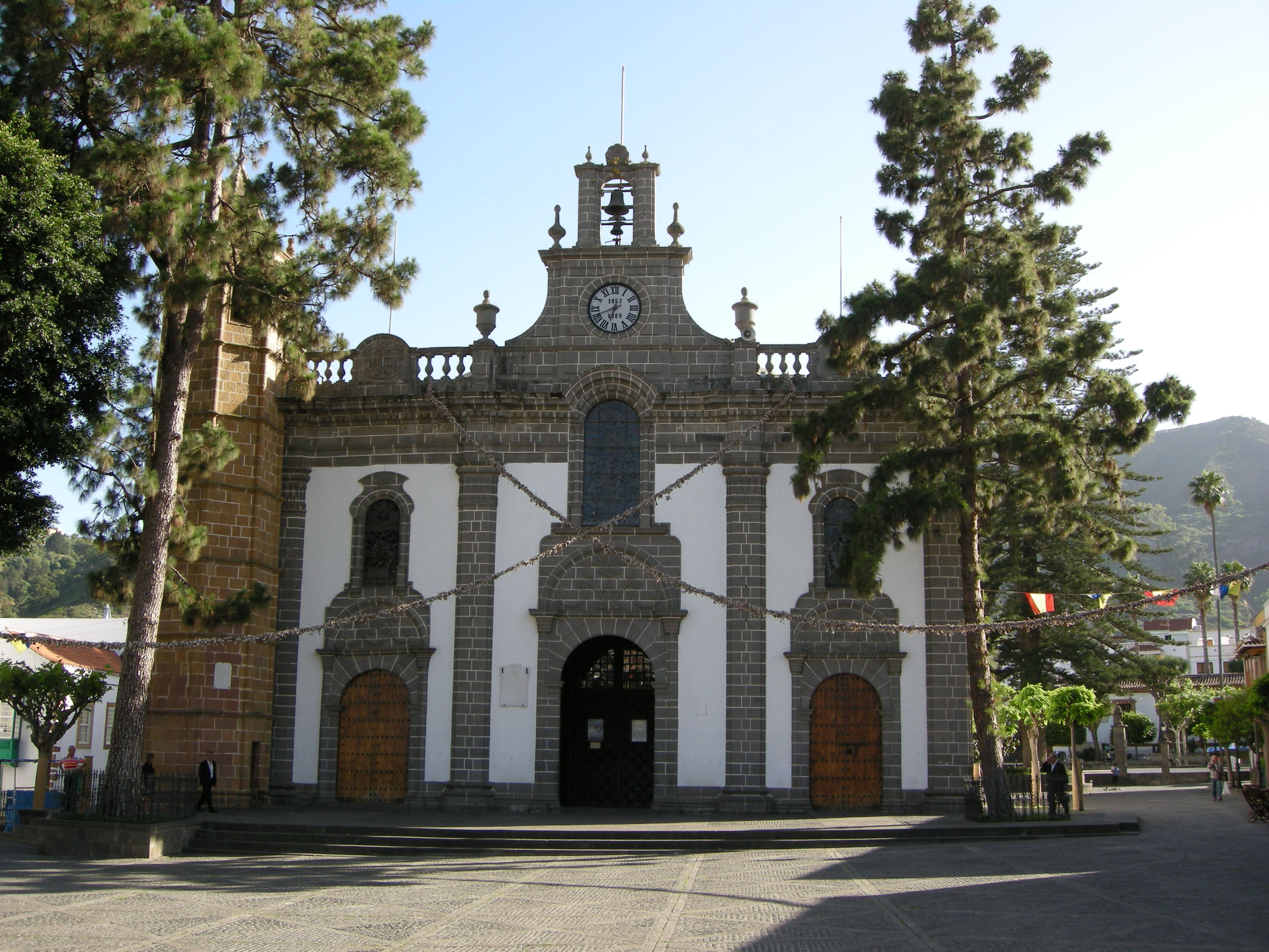 Basílica de Nuestra Señora del Pino